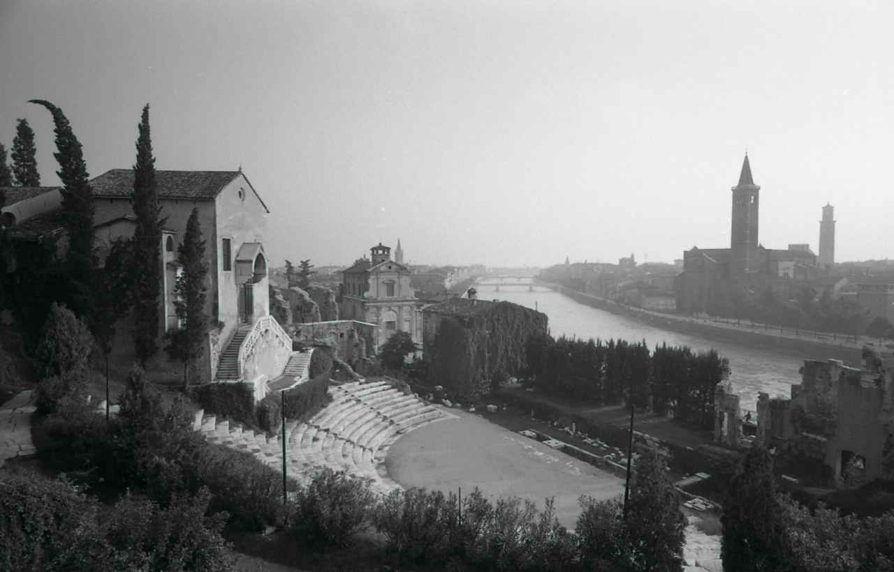 Servizio fotografico : Verona, 1965 / Paolo Monti. - Strisce: 5, Fotogrammi complessivi: 25 : Negativo b/n, gelatina bromuro d'argento/ pellicola ; 35 mm. - ((I fotogrammi hanno una doppia numerazione. - Sul portanegativi: Leica IF. - Occasione: Pubblicazione: "Emilio CECCHI, Natalino SAPEGNO (a cura di), Storia della Letteratura Italiana, 9 voll., Milano, Garzanti, 1966 e segg."